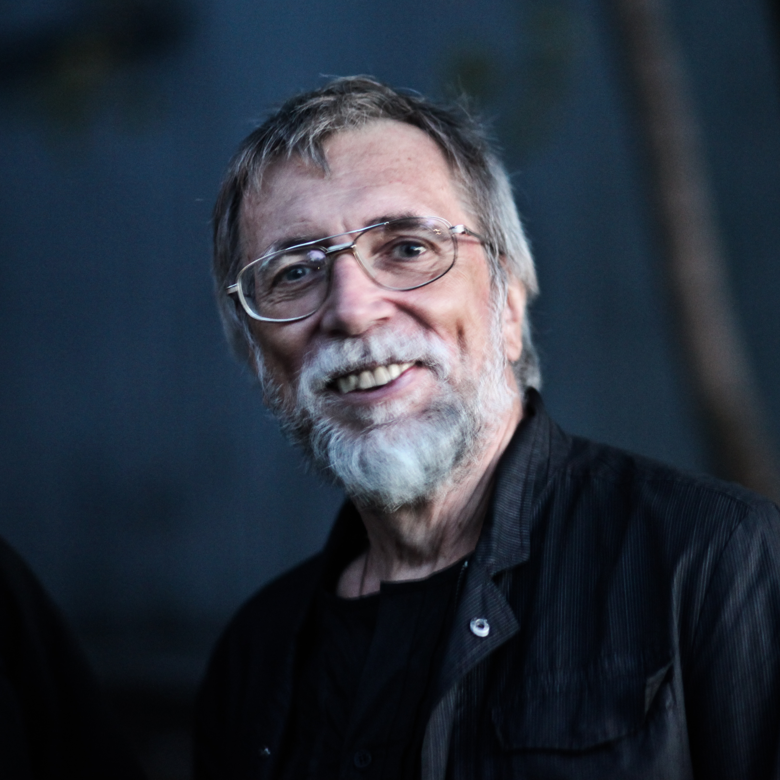 Композитор Владимир Мартынов